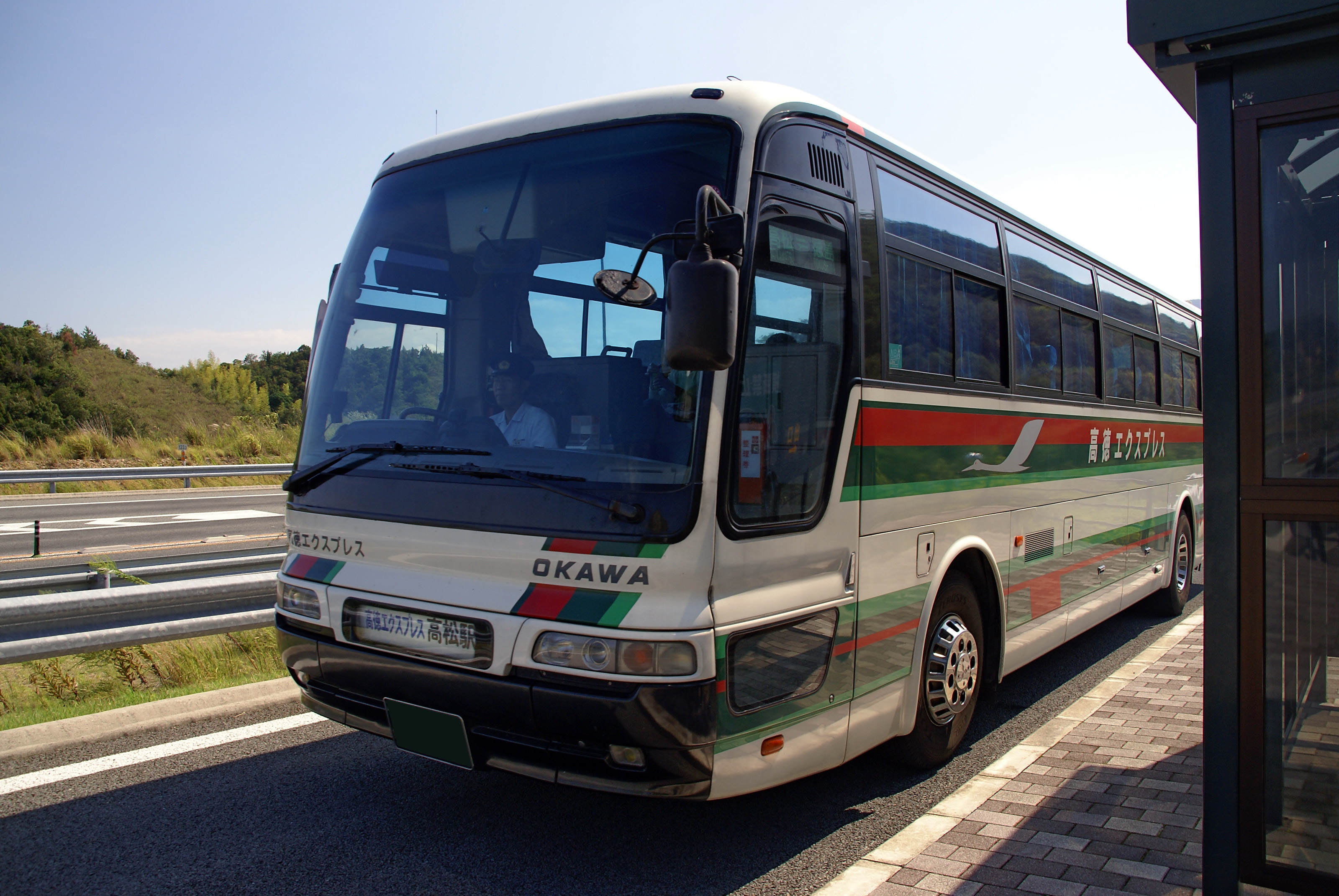 Takamatsu Expressway Hiketa bus stop in Higashikagawa, Kagawa prefecture, Japan